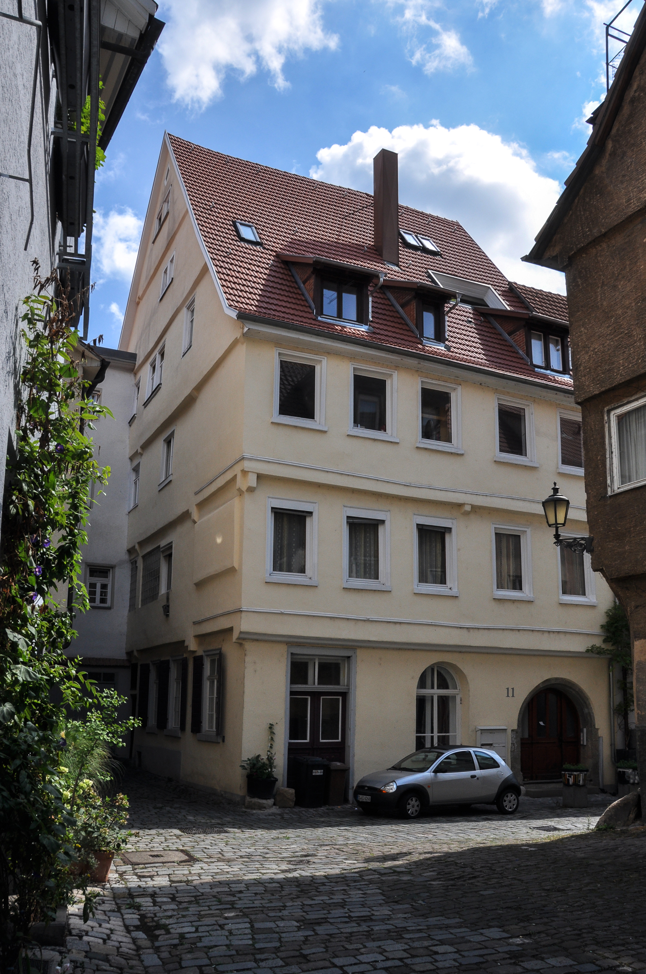 Obwohl frisch renoviert, kann das Gebäude seine Entstehungszeit nicht verleugen, was ja auch ganz im Sinne des Denkmalschutzes ist.